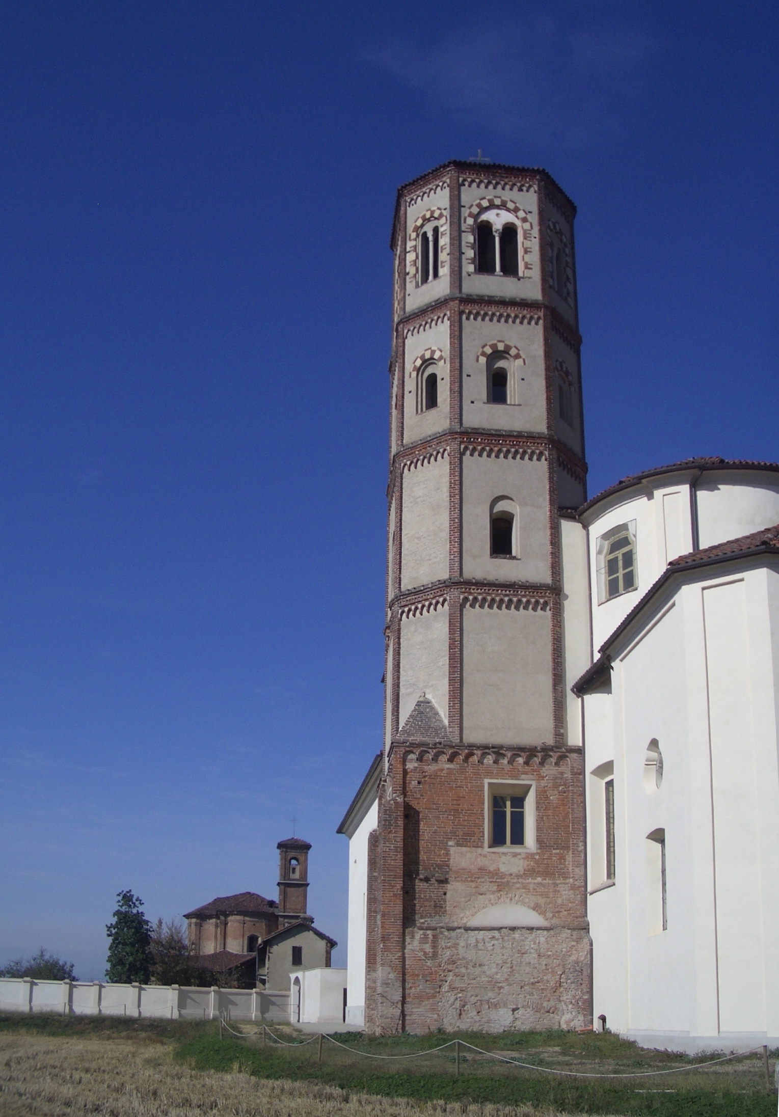 Campanile, XII century, Lucedio Abbey , Trino, Vercelli, Italy